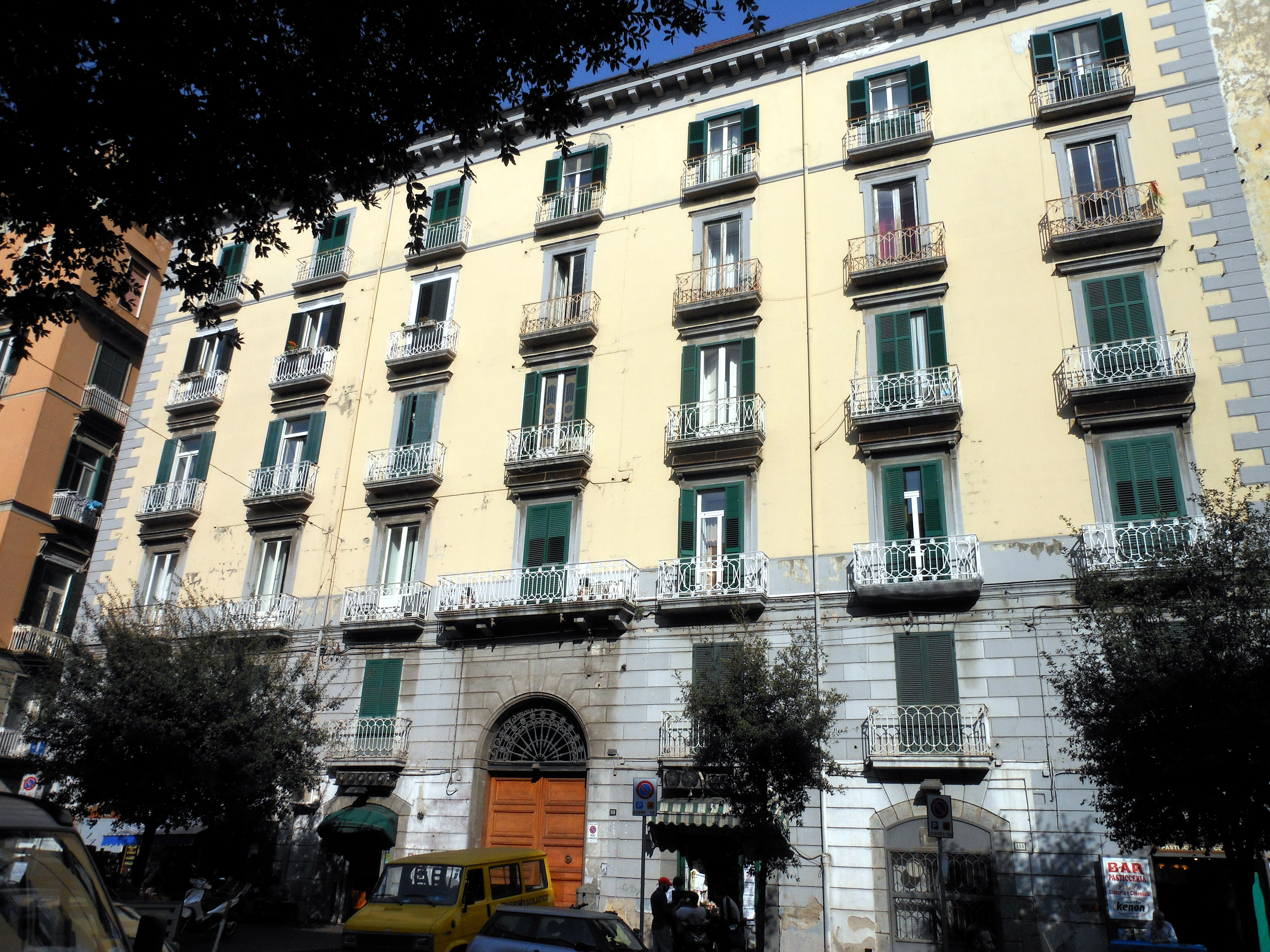 Palazzo Mautone, sito in via Santa Teresa degli Scalzi, opera di Pietro Valente